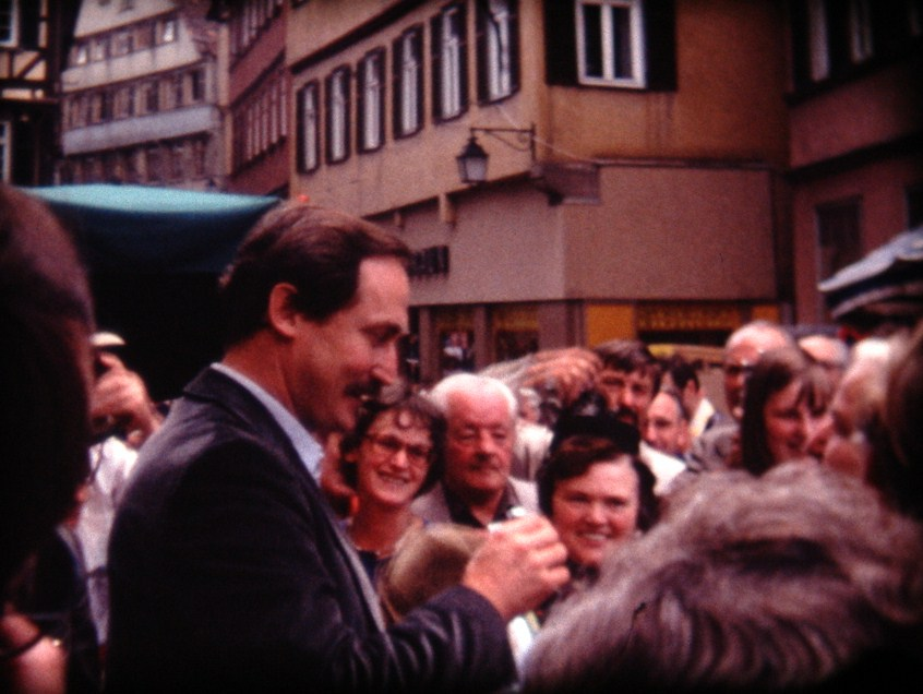 Oberbürgermeister Dr. Eugen Schmid bei einer Schnapsprobe auf dem Historischen Markt anläßlich des Stadtfestes "900 Jahre Tübingen" im Jahr 1978. Standfoto aus einem alten Super 8 Schmalfilm.